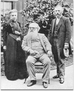 Annie Besant, Henry Steel Olcott und William Quan Judge in London, kurz nach dem Tod von Helena Blavatsky im Mai 1891